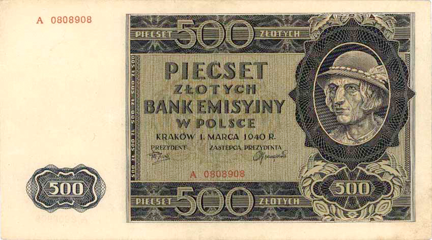 500 złotych = 250 Reichsmark